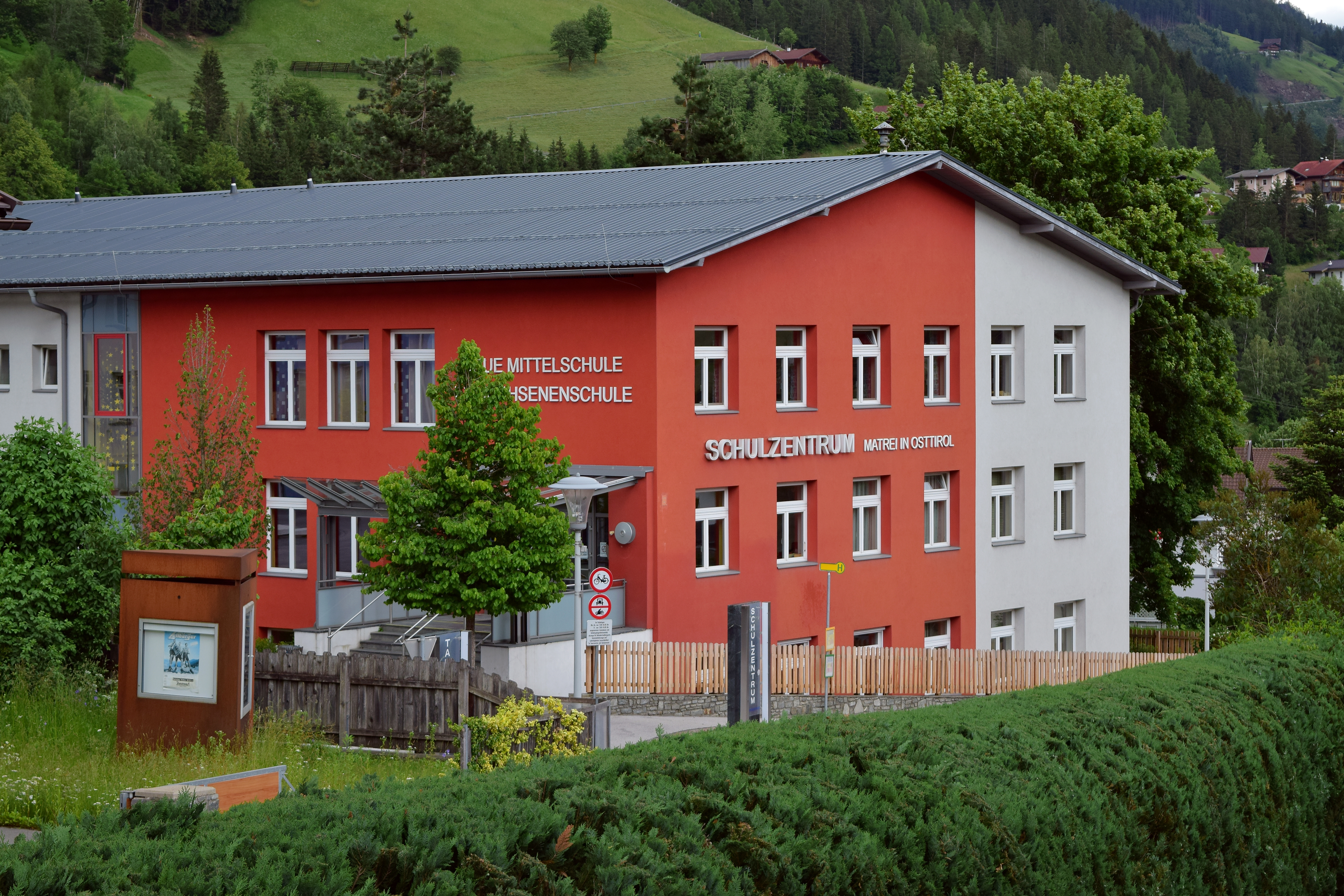 Das Schulzentrum Matrei (Lienzer Straße 17) beherbergt eine Volksschule,[1] eine Neue Mittelschule (früher Hauptschule)[2], eine Polytechnische Schule,[3] eine Sonderschule mit Sonderpädagogischem Zentrum[4] und eine Erwachsenenschule.[5] Die Volksschule wurde 1961, die Hauptschule 1971 eröffnet. Zur Geschichte des Matreier Schulwesens siehe dieses PDF.